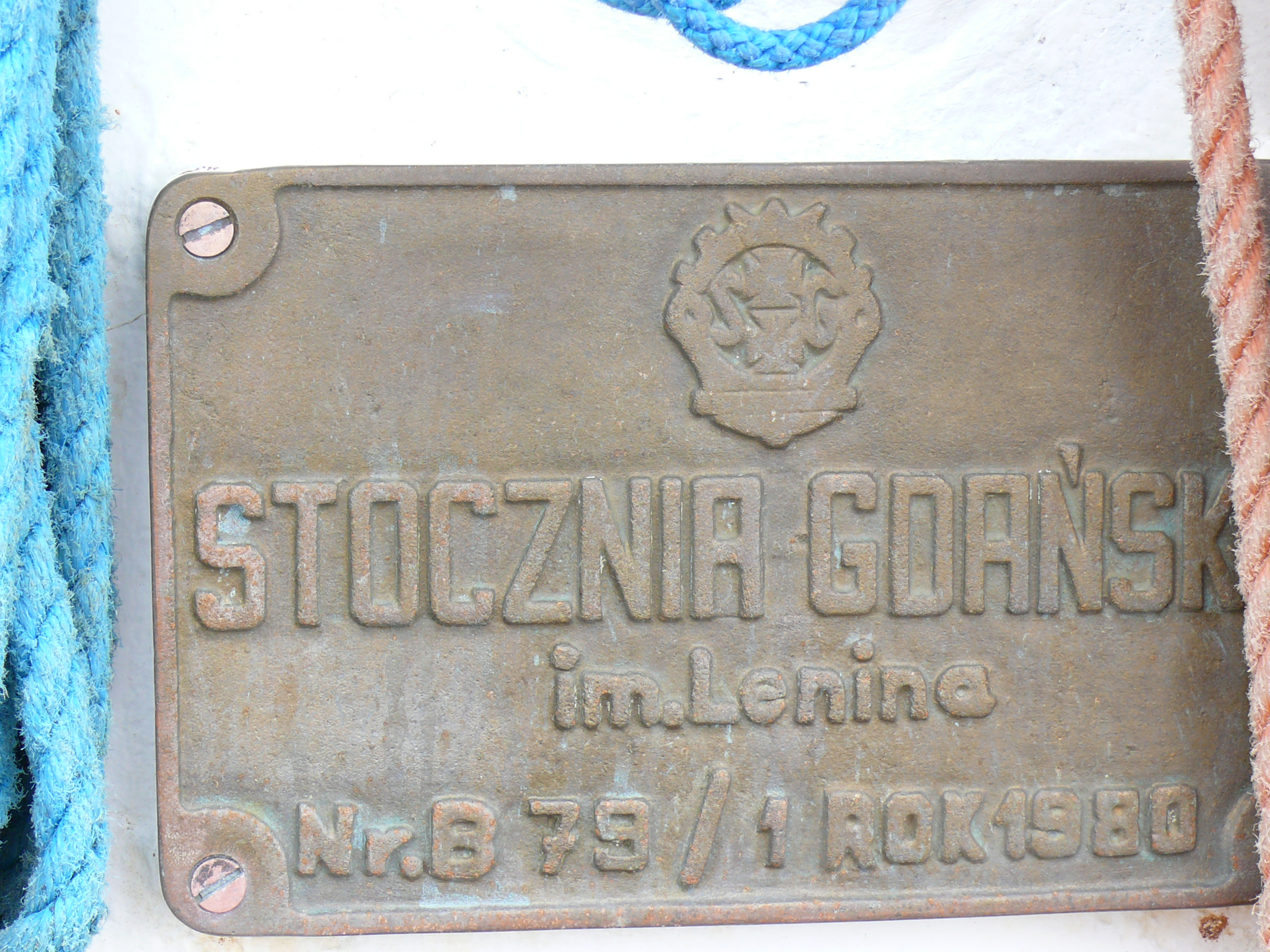 Plaque de constructeur sur le pont du Pogoria, trois mâts construit à Gdansk en 1980 - Photo prise à l'Armada de Rouen - 2008